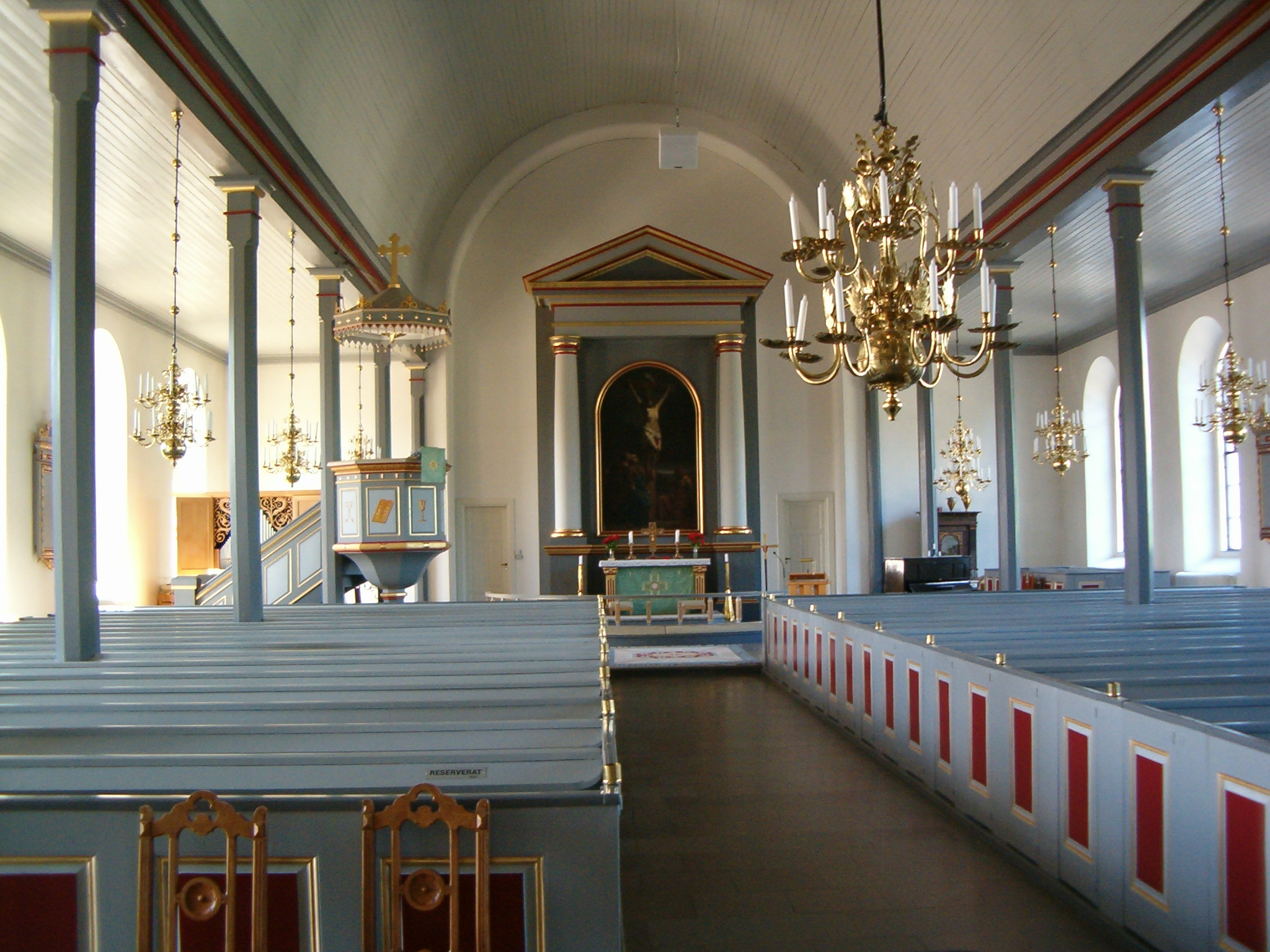 Näsums kyrka